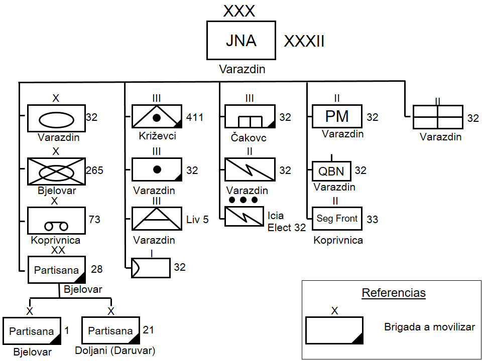 Desarrollado sobre la base de Hrastović, I. (2006). Zauzimanje vojarni JNA u Varaždinu i predaja 32. varaždinskog korpusa JNA. Polemos, IX (18), 119-135. Preuzeto s